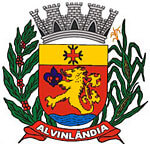 Brasão de Alvinlândia